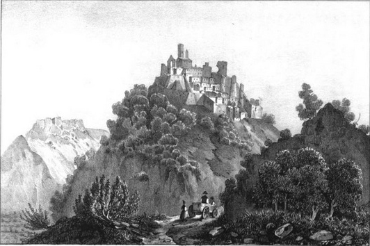 Clansayes